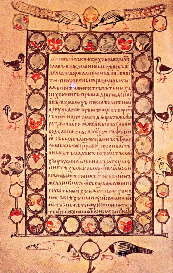 Страница от руски препис на старобългарски сборник. Преводът от гръцки е направен около 920 г. по поръчка на цар Симеон. Преписът е изготвен за киевския княз Святослав Ярославович. Състой се от 266 пергаментни листа. Съдържа 5 миниатюри върху цяла страница. Преписан е от дякон Йоан и друг неизвестен книжовник. В началото и в края са притурени два преписа от "Похвала на цар Симеон", която е преадресирана за княз Святослав. Преписът откриват К. Ф. Калайдович и П. М. Строев през 1817 г. в библиотеката на манастира "Възнесение Христово" край Москва. Оригиналът се пази в ръкописния отдел на Държавния исторически музей в Москва (Син. № 1043).